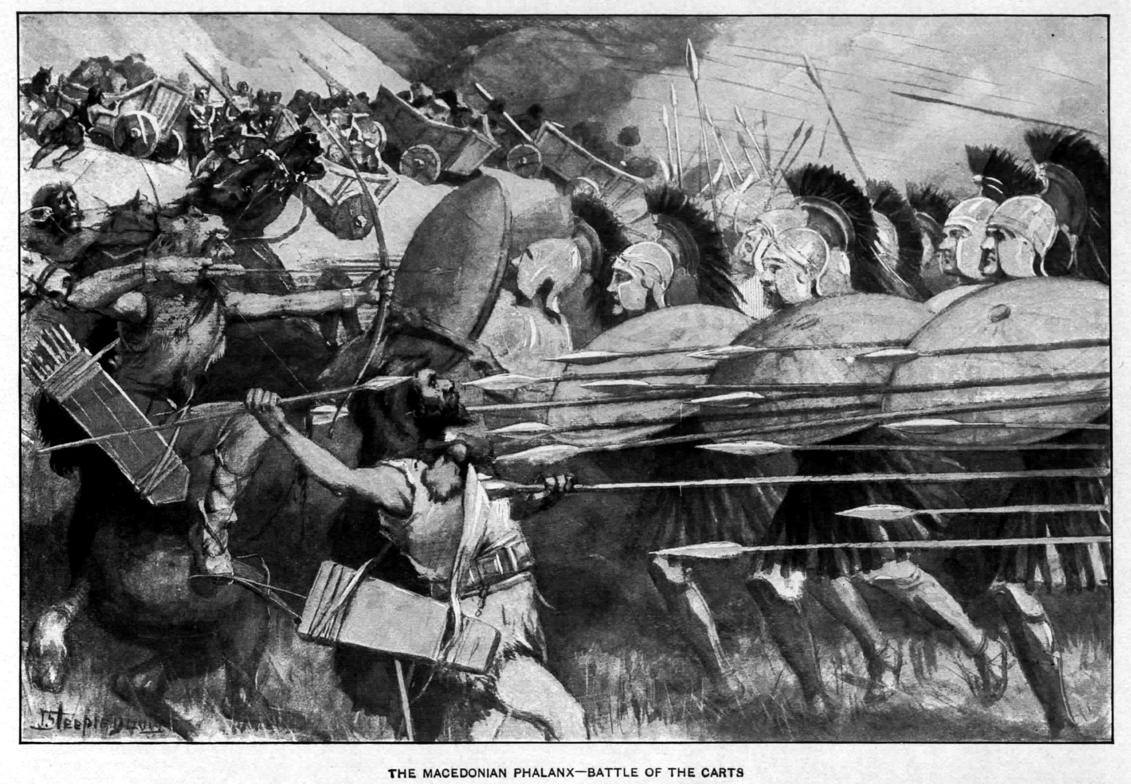 Alexander old drawings